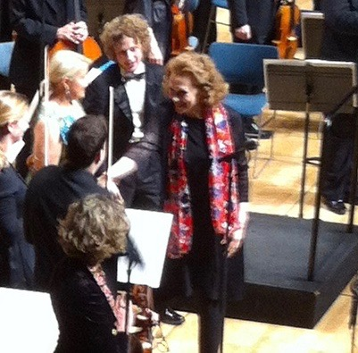 Kaija Saariaho. Cropped from File:Kaija Saariaho à la Cité de la Musique (8673733623).jpg